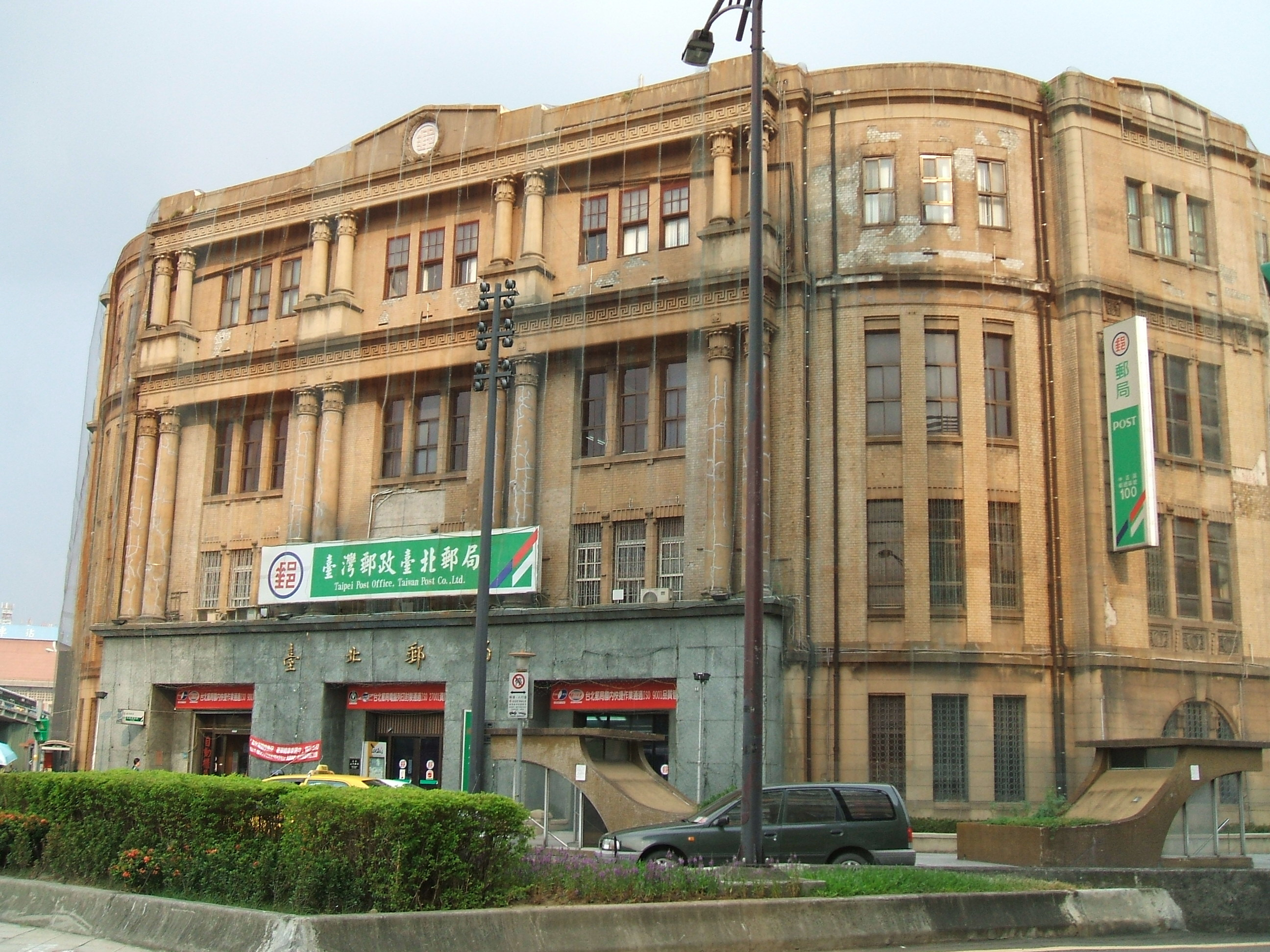 台北市にある台北郵局ビル。